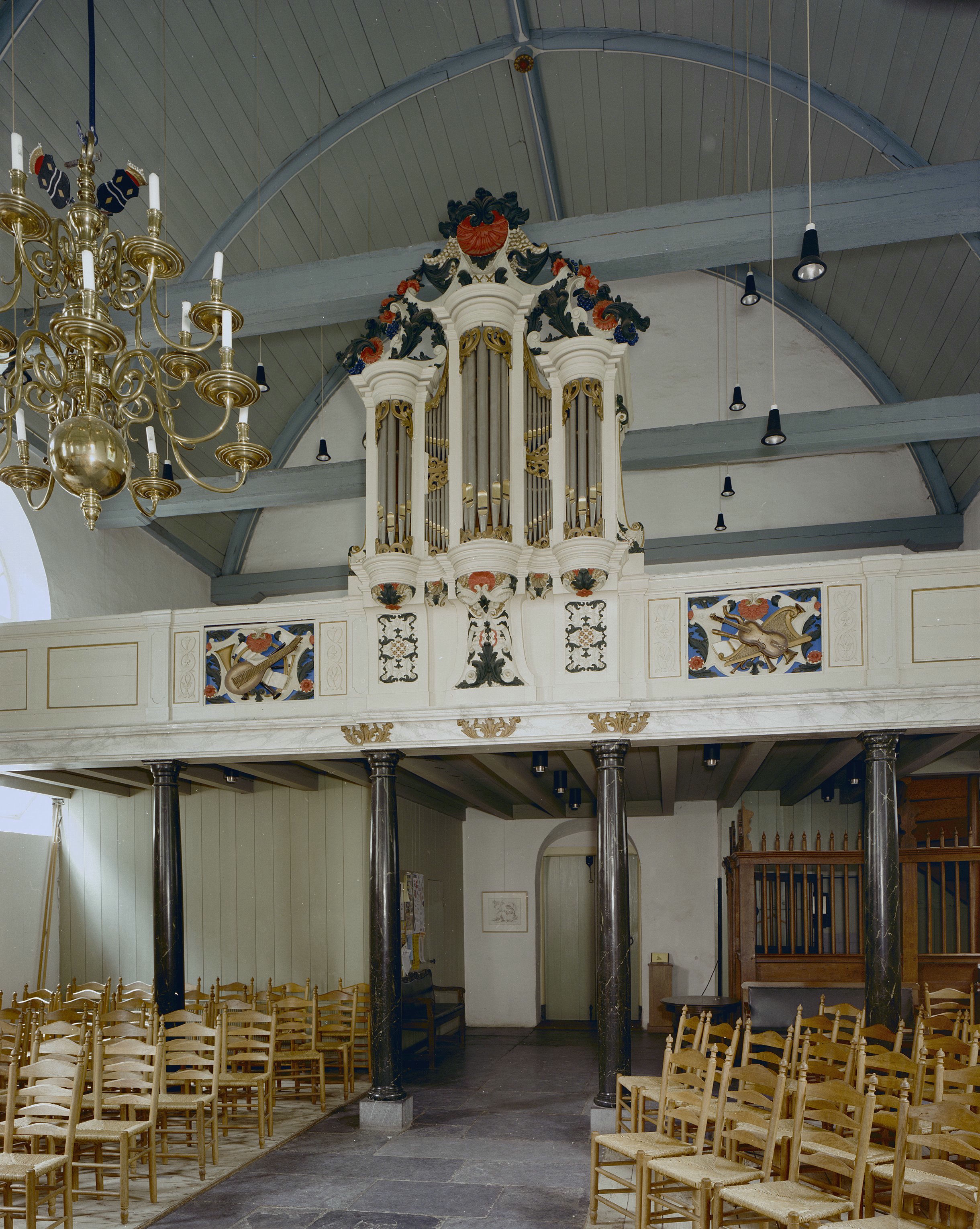 Nederlands Hervormde Kerk: Interieur, aanzicht orgel, orgelnummer 649 (opmerking: Gefotografeerd voor Het Historische Orgel in Nederland 1726-1769, bladzijder 138)